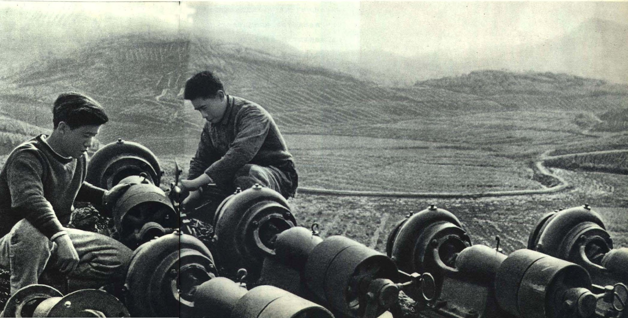 1963-05 1963年北碚机械厂